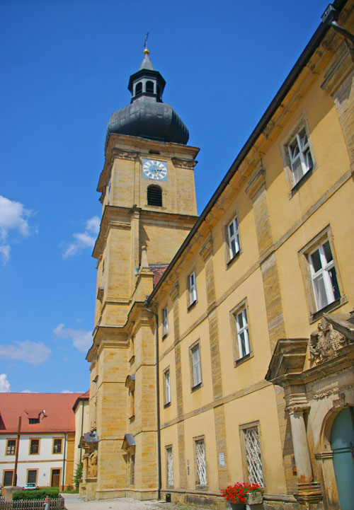 Klosterkirche von Ensdorf, ehemalige Benediktiner-Abtei